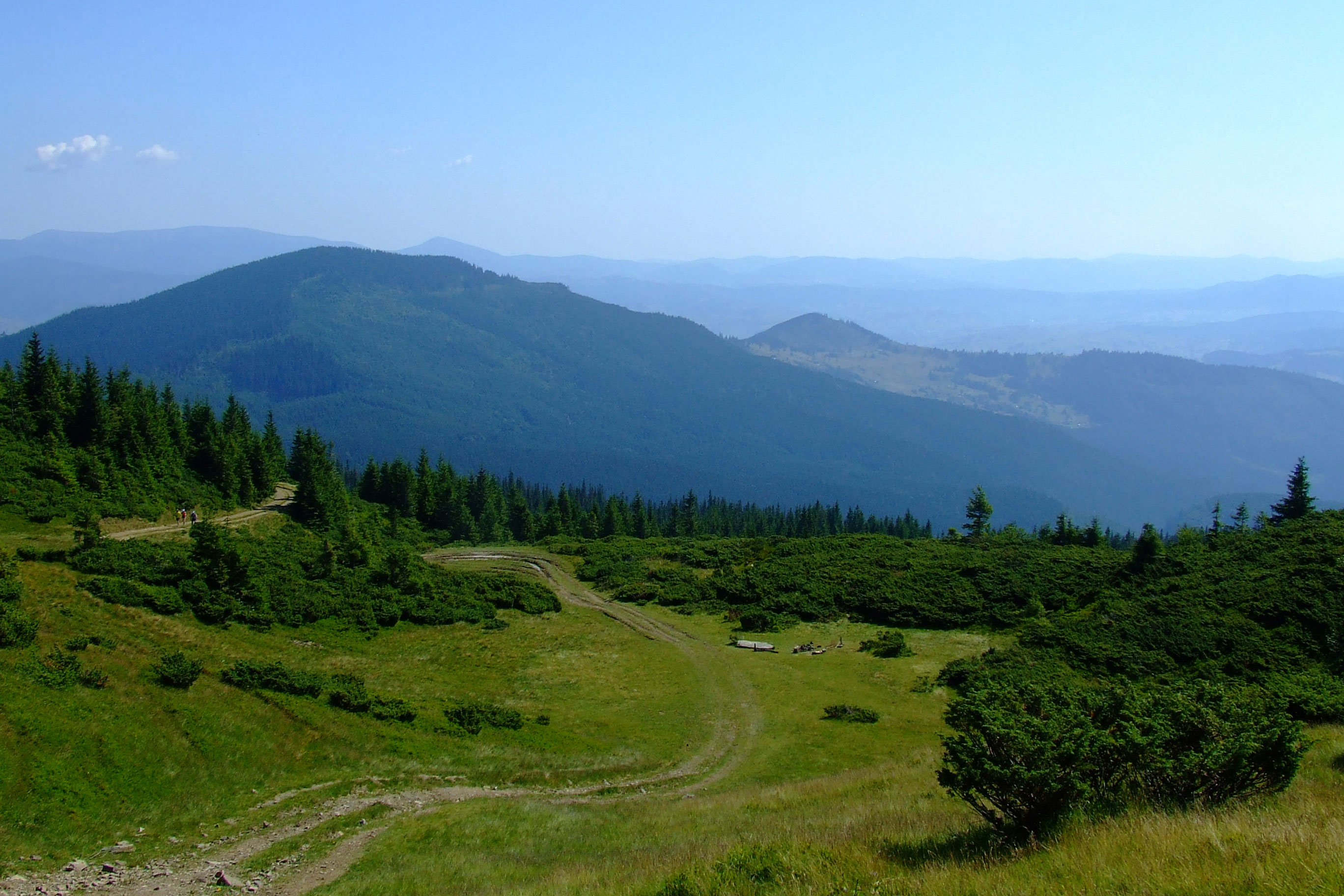 Карпатський біосферний заповідник, Рахівський, Тячівський, Хустський, Виноградівський райони